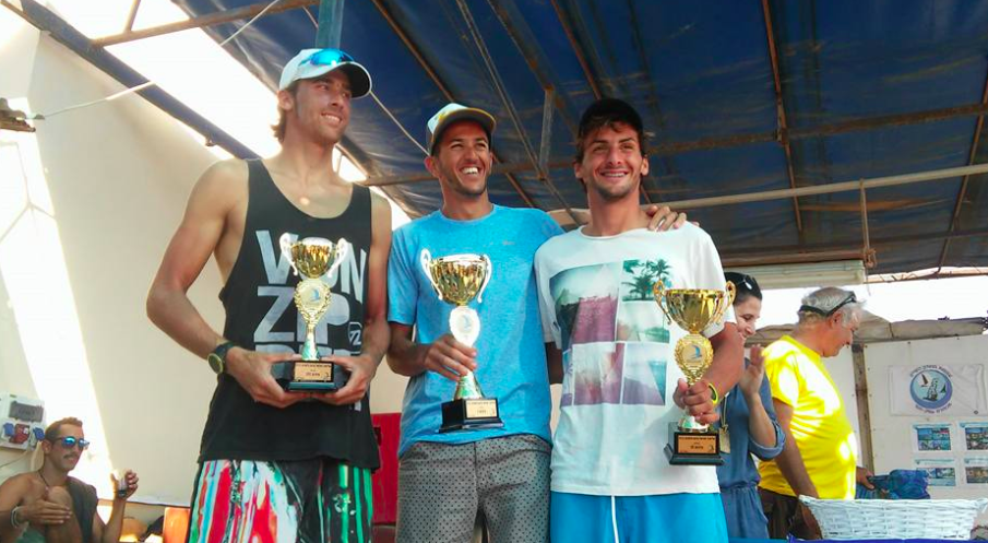 יואב עומר ביחד עם שחר צוברי ונמרוד משיח